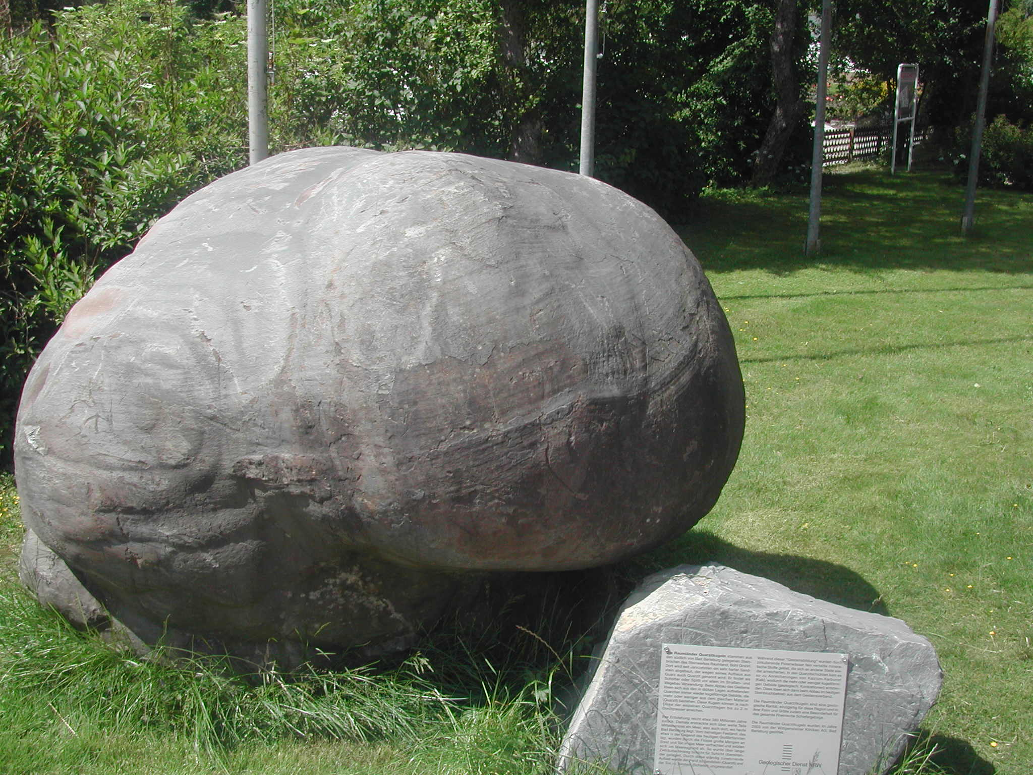 Bad Berleburg, „Raumländer Quarzitkugel“ aus den Steinbrüchen des Steinwerkes Raumland-Böhl GmbH. Solche Kugeln werden „Konkretionen“ genannt, sind etwa 330 Mio. Jahre alt und können bis 2 m Durchmesser erreichen.